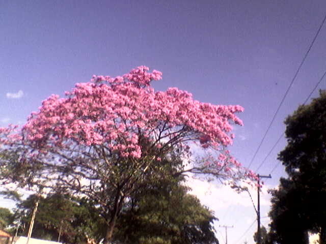 Tajy (Lapacho en español) en las calles de Asunción, Paraguay.